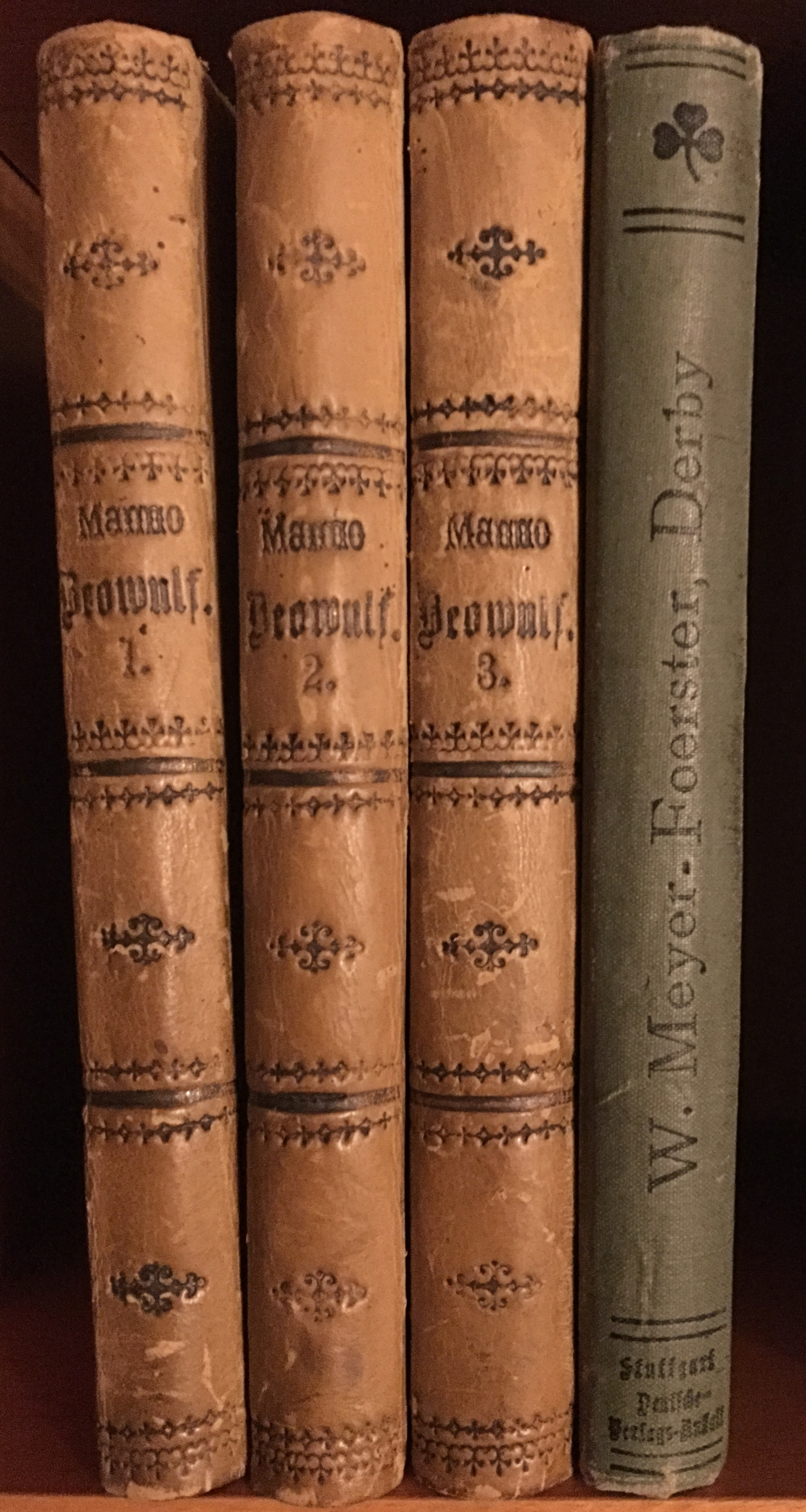 Erste Sportromane in Deutschland